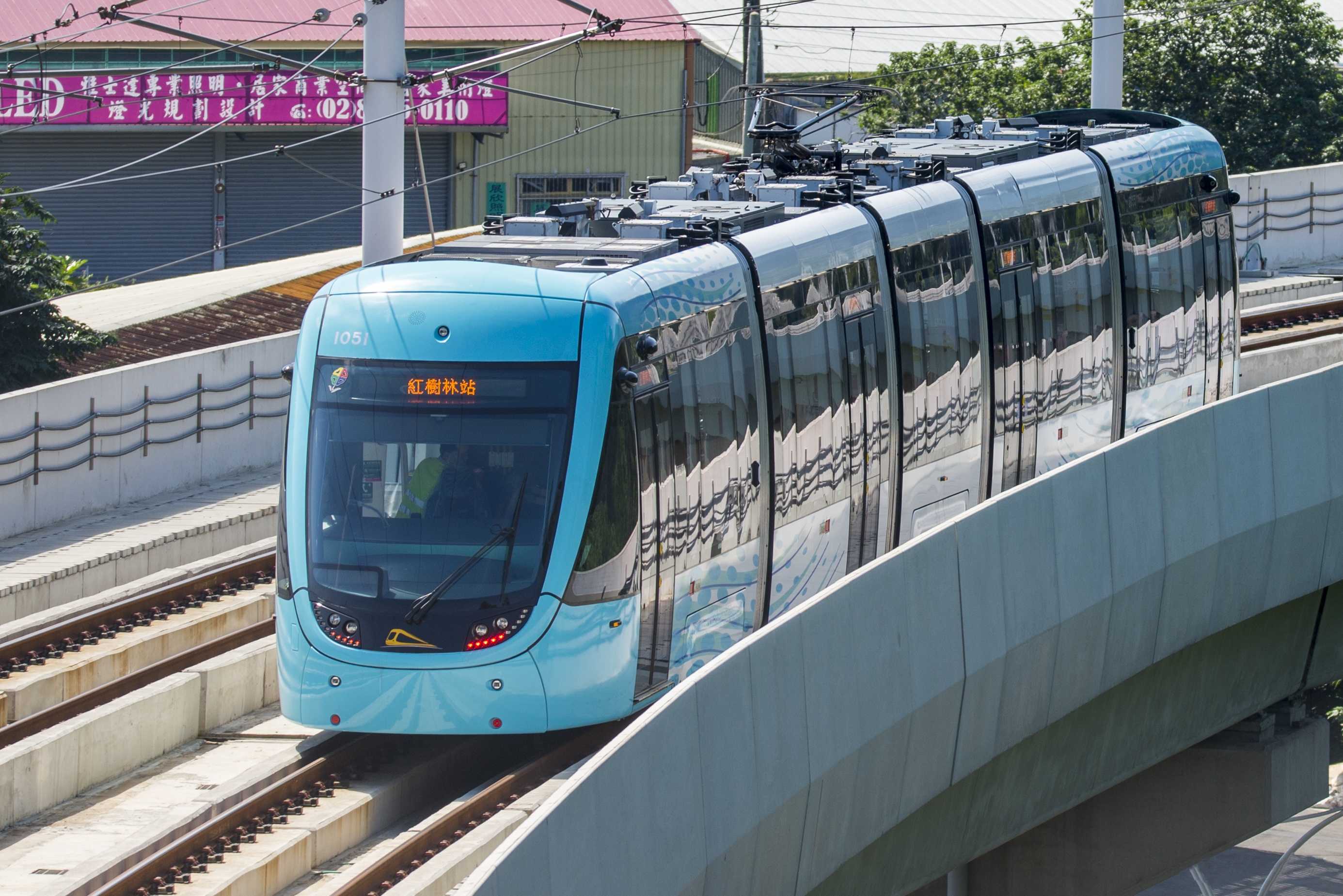 中文（台灣）: 淡海輕軌列車淡金鄧公站往竿蓁林站